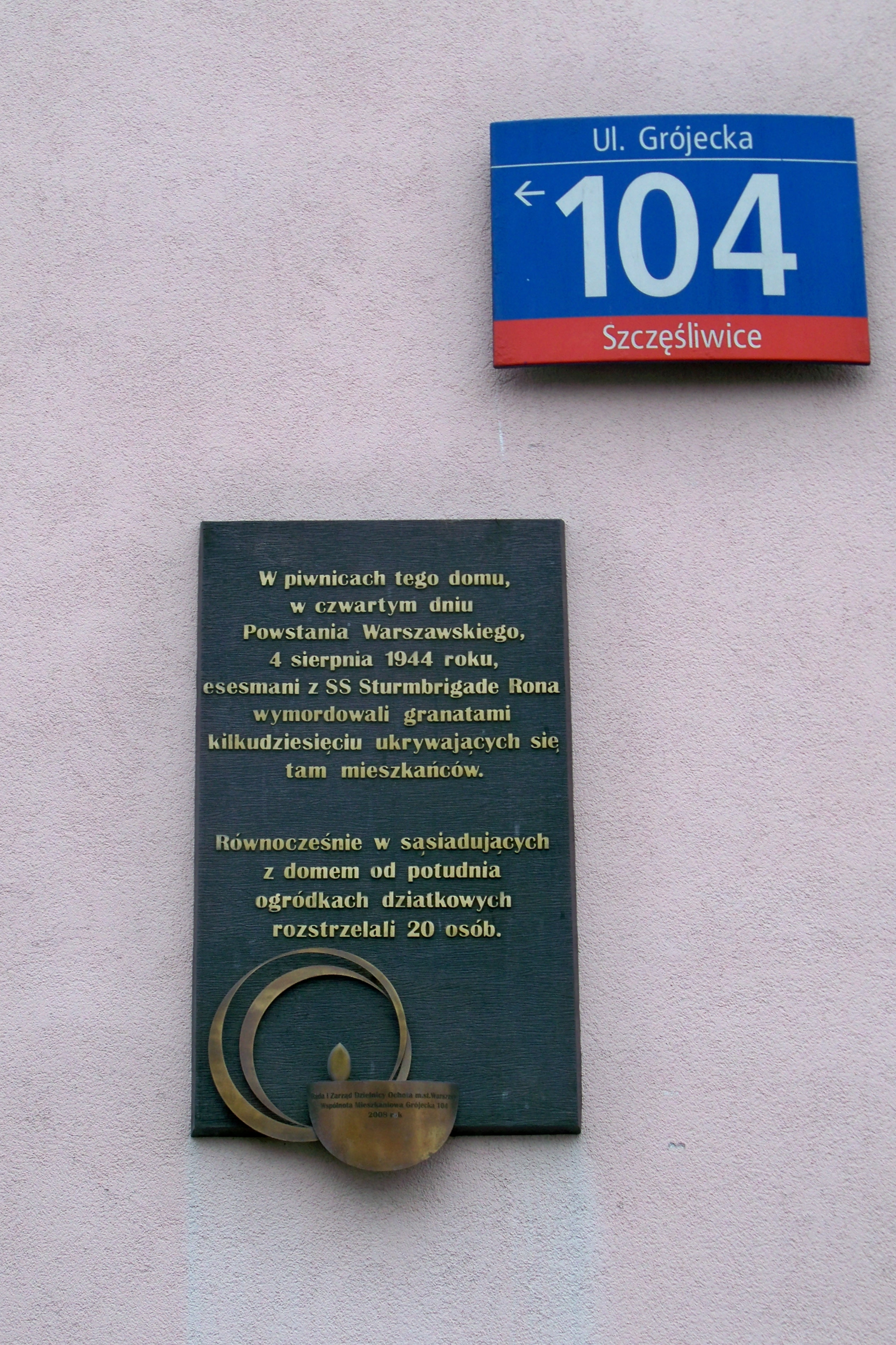 Tablica pamiątkowa na bloku przy ulicy Grójeckiej 104 w Warszawie oraz tablica MSI: Ul. Grójecka 104 (Szczęśliwice). Napis na tablicy pamiątkowej głosi: "W piwnicach tego domu w czwartym dniu Powstania Warszawskiego, 4 sierpnia 4944 roku, essesmani z SS Sturmbrigade Rona wymordowali granatami kulkudziesięceku ukrywających się tam mieszkańców. Równocześnie w sąsiadujących z domem od południa ogródkach działkowych rozstrzelali 20 osób. Rada i Zarząd Dzielnicy Ochota m. st. Warszawy wspólnota Mieszkaniowa Grójecka 104 2008 rok"